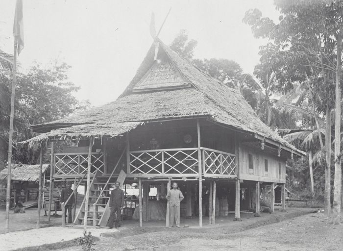 foto. Aanzienlijk minder spectaculair dan het traditionele huis van de Toradja's is het Boeginese huistype. Het behoort tot het 'Maleise' prototype, gebouwd op palen, met een vloer en wanden van planken of bamboe en een dak met 'stro' gedekt. Het woongedeelte van het huis kan slechts via een trap bereikt worden, die eerst naar de veranda leidt. De ruimte onder het huis is soms geheel of ten dele afgeschoten voor vee. Op veel Boeginese huizen vinden we, net als op de foto, gekruiste versieringen die de horens van een waterbuffel (karbouw) voorstellen. Het is niet bekend of de fotograaf de hierboven geciteerde beschrijving ('mijn Boegineesch paleis') cynisch bedoelde. (P. Boomgaard, 2001). "Mijn Boegineesch paleis", het huis van een Europeaan in Parigi